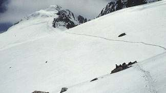 Aneto. Cima y glaciar vistos desde el portillón superior Tomada de es::fr:Image:Aneto3.jpg, donde fue subida por Nezumidumousseau photo personnelle 1996, prise depuis le Portillon supérieur; licence : GDFL lien externe